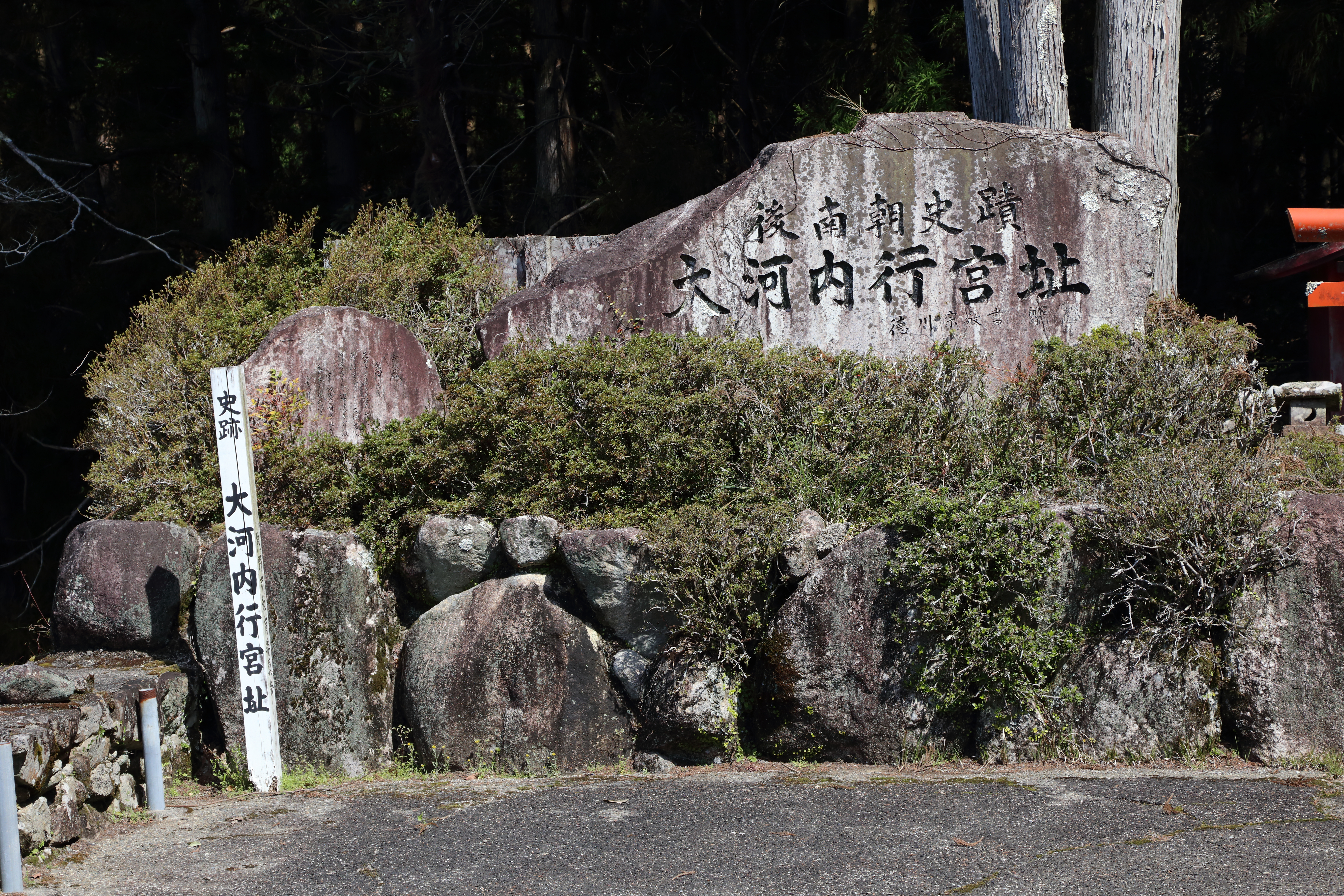 大河内行宮址 三重県熊野市紀和町大河内 紀和町大河内